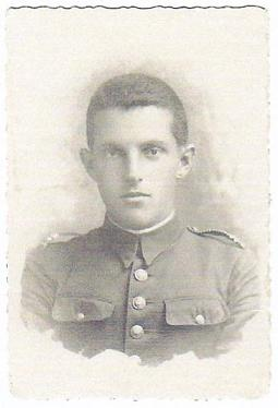 Ernest Kościński w mundurze podchorążego słuchacza szkoły oficerów rezerwy WP